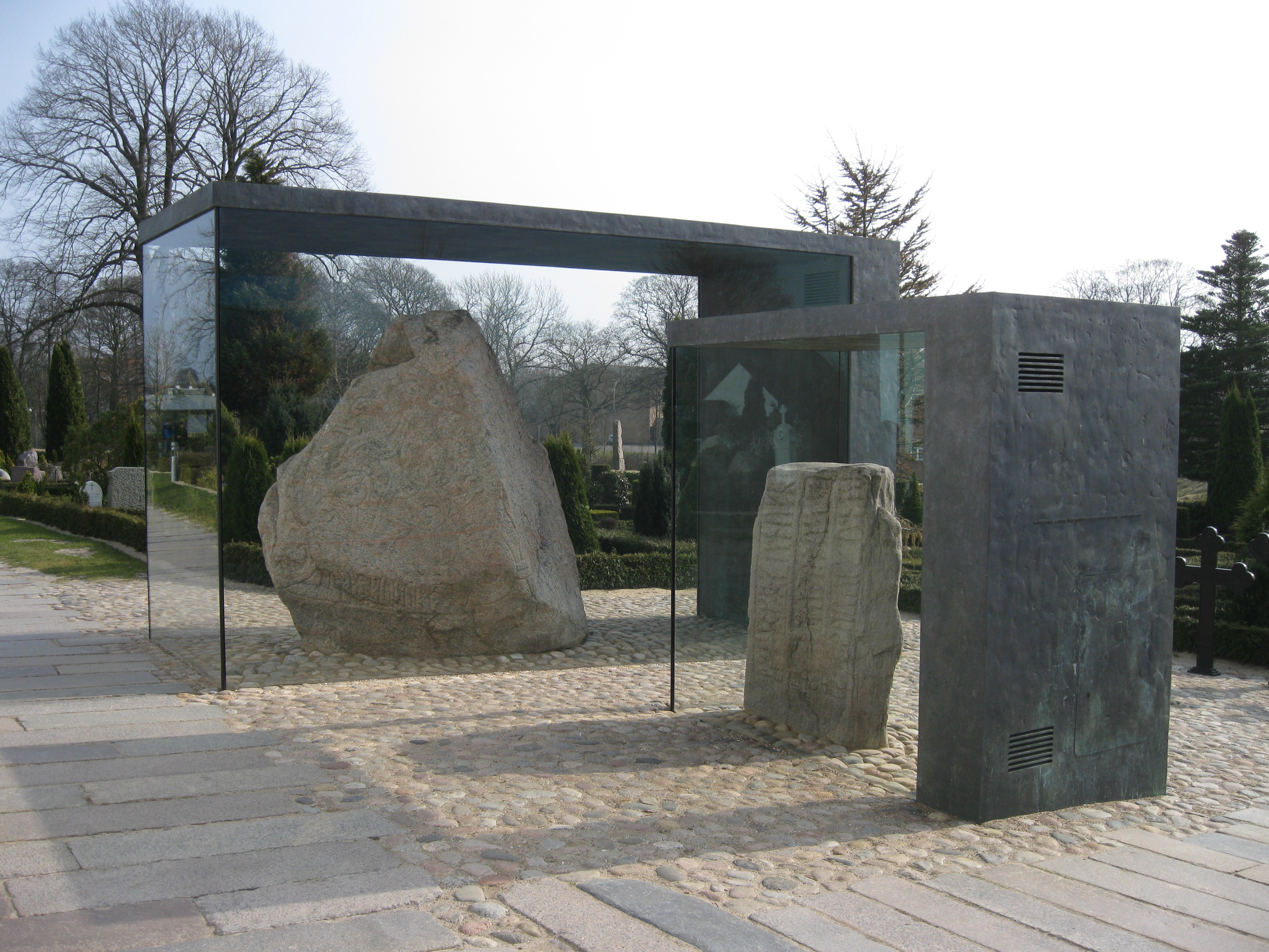 Runestenene i Jelling efter bygning af glashuse til beskyttelse af dem